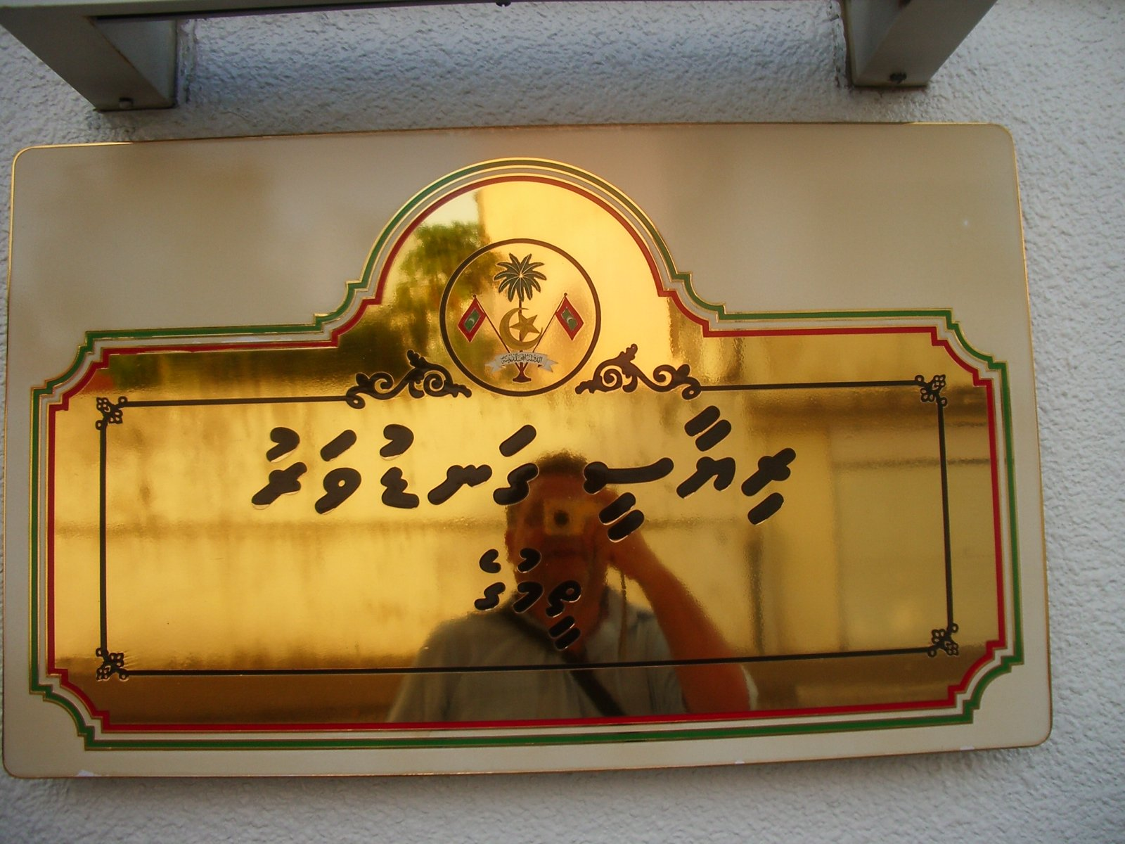 Placa en divehi al Palau presidencial a Male, illes Maldives; foto feta per J. Ollé el juliol del 2006.